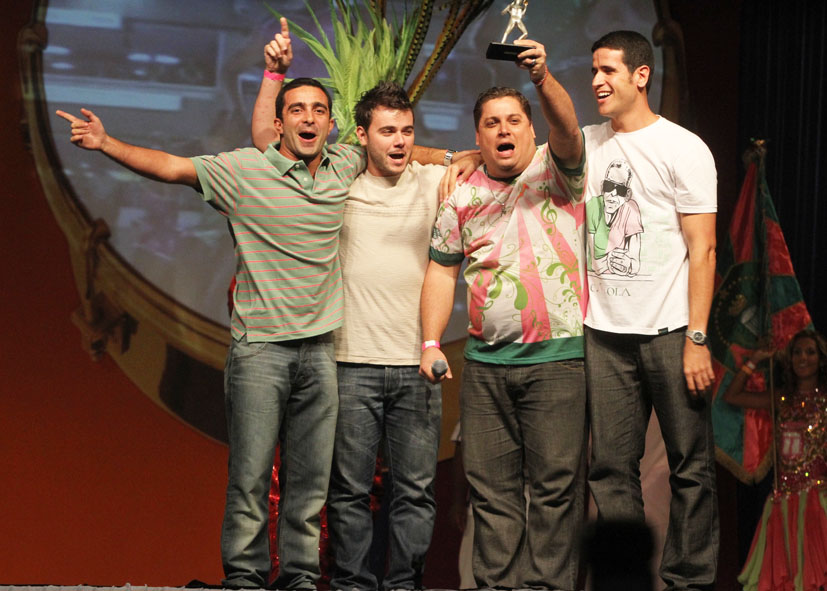 Fotógrafo Henrique Matos